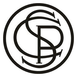 Escudo do Sport Club Corinthians Paulista, utilizado de 1916 a 1919.